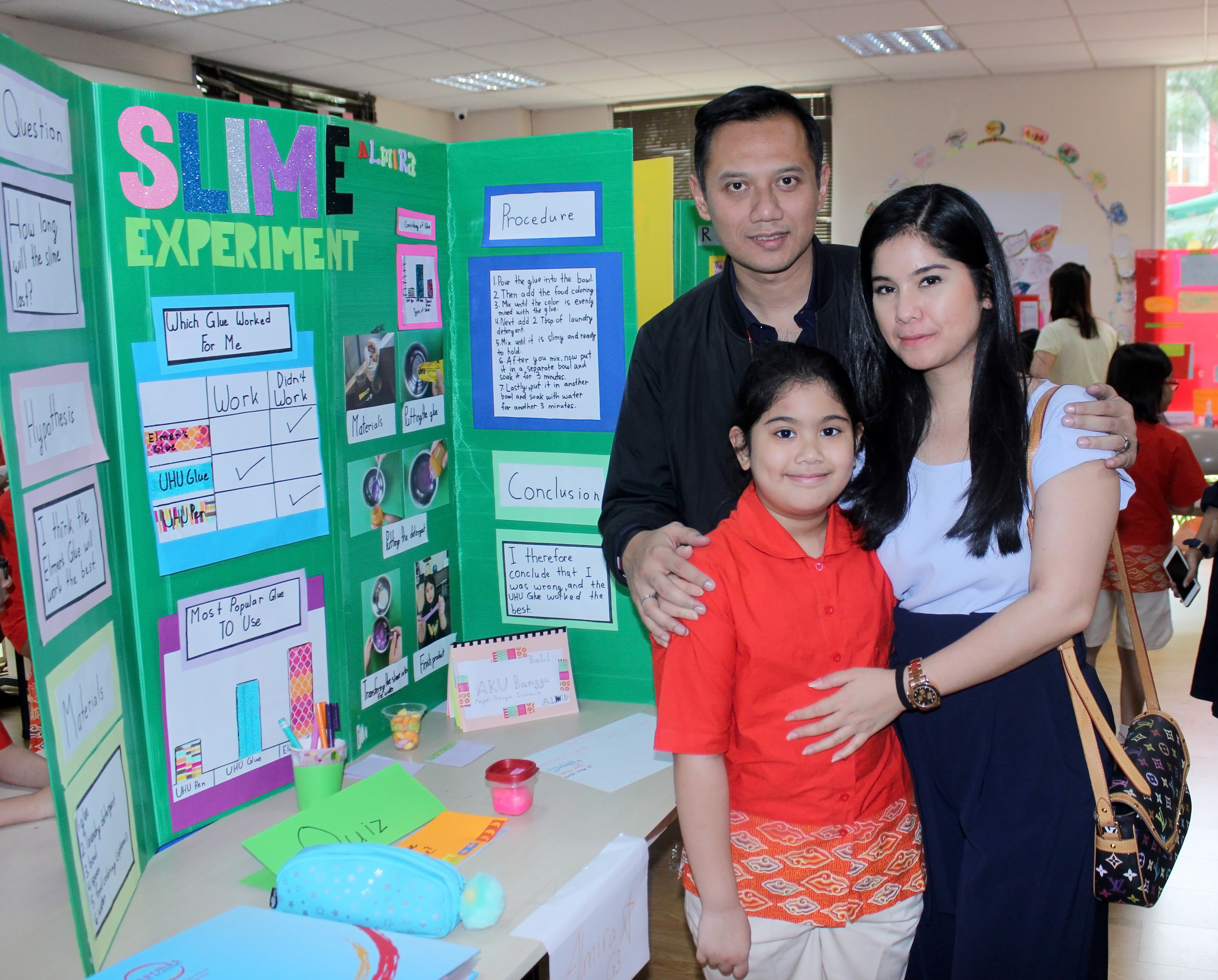 Foto AHY bersama isteri dan anaknya.